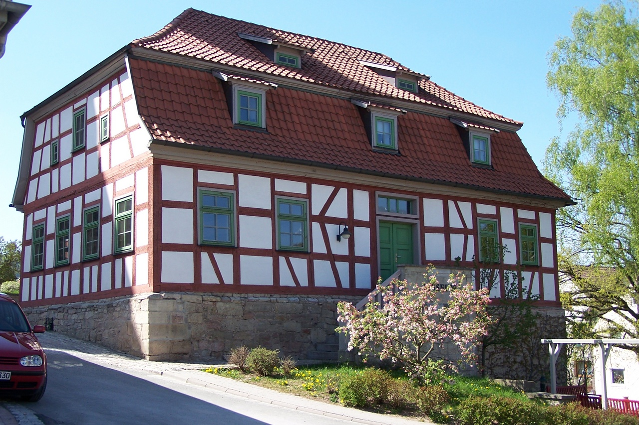 Museum in Jüchsen, ehemals Schule